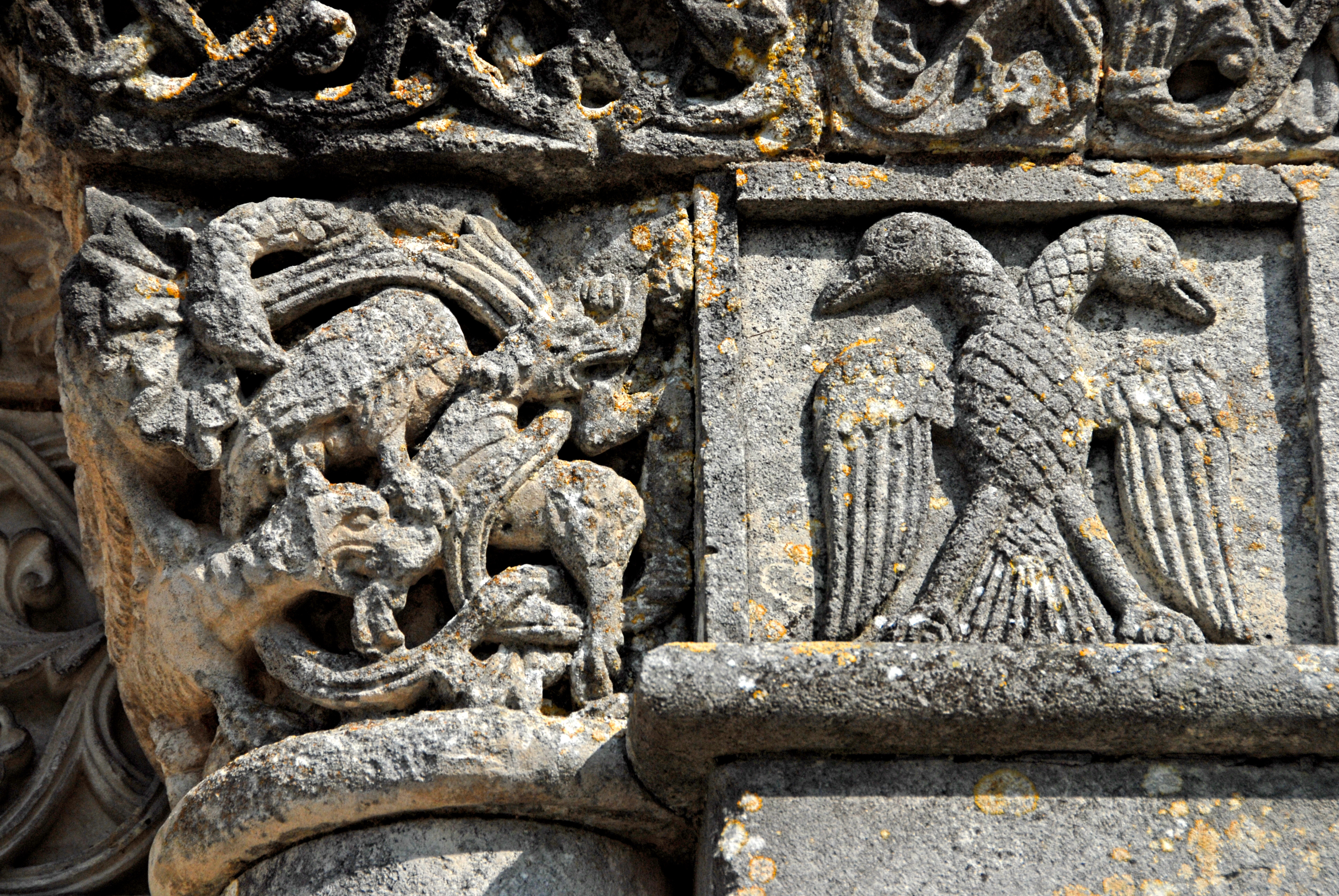 Genzac-la-Pallue, Kapitell links vom Hauptportal